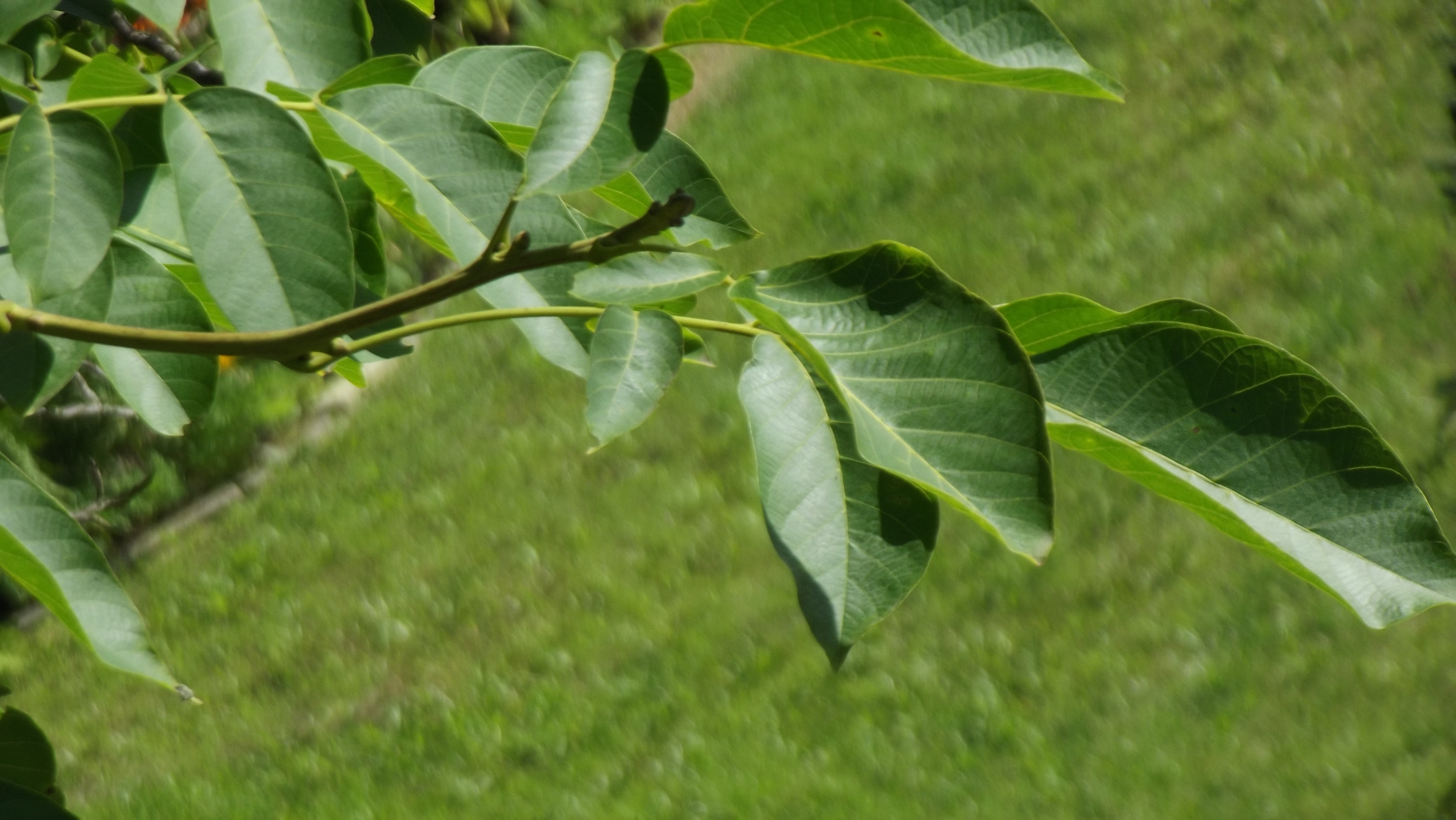 Juglans regia - Detail na listy ořešáku